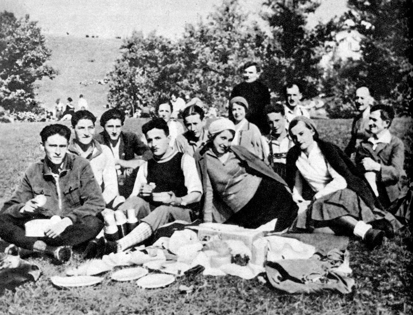 Srpskohrvatski / српскохрватски: Kosta Nađ uoči odlaska u Španiju sa prijateljima